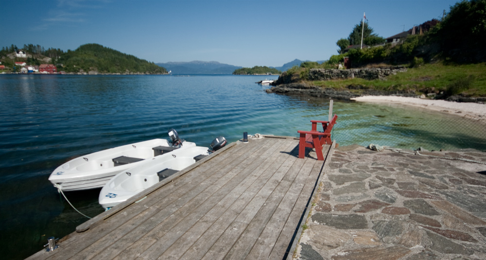 Sjernarøy Maritim, Bjergøy, Sjernarøy